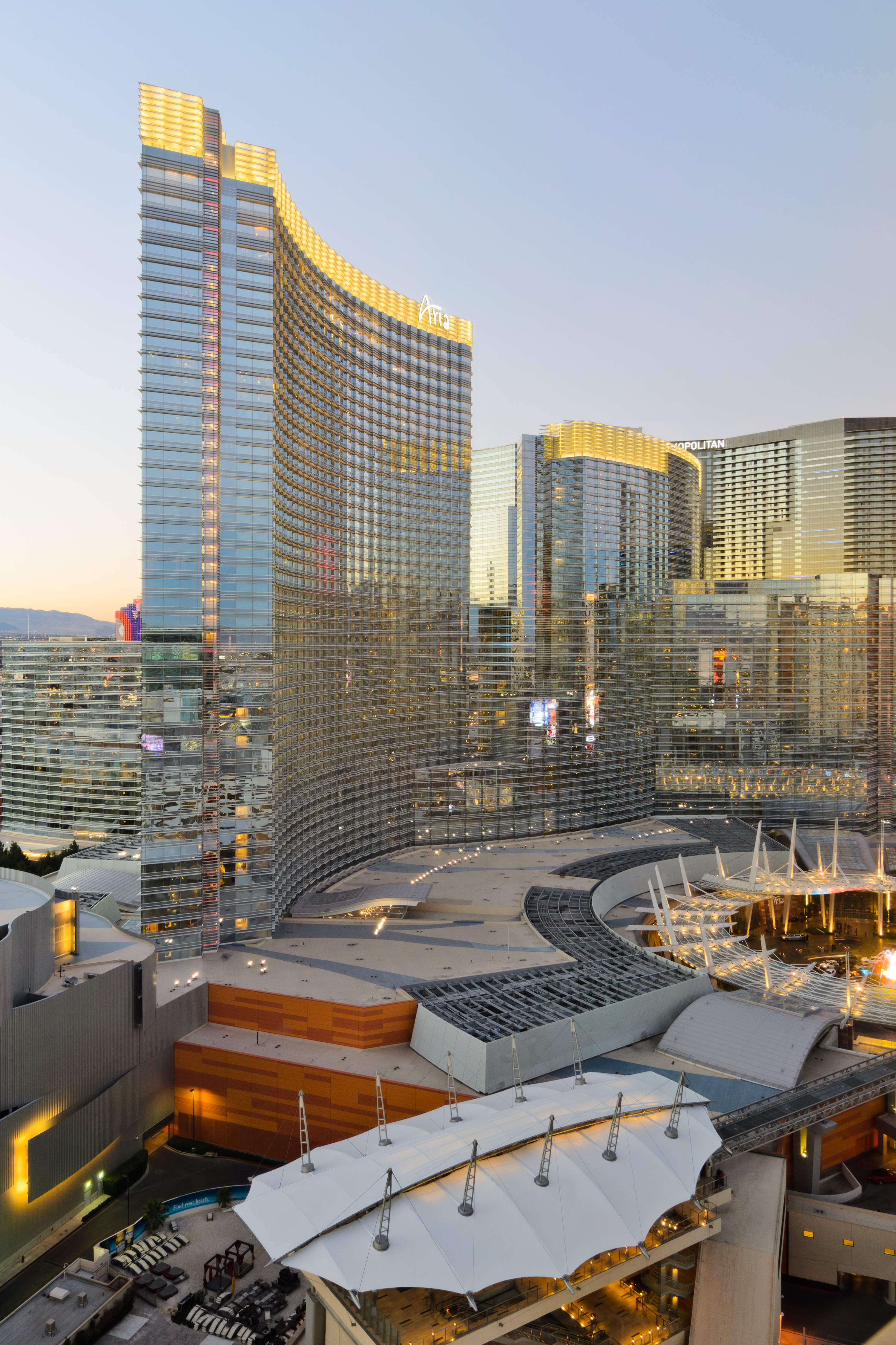 Aria Resort and Casino, Las Vegas, Nevada.